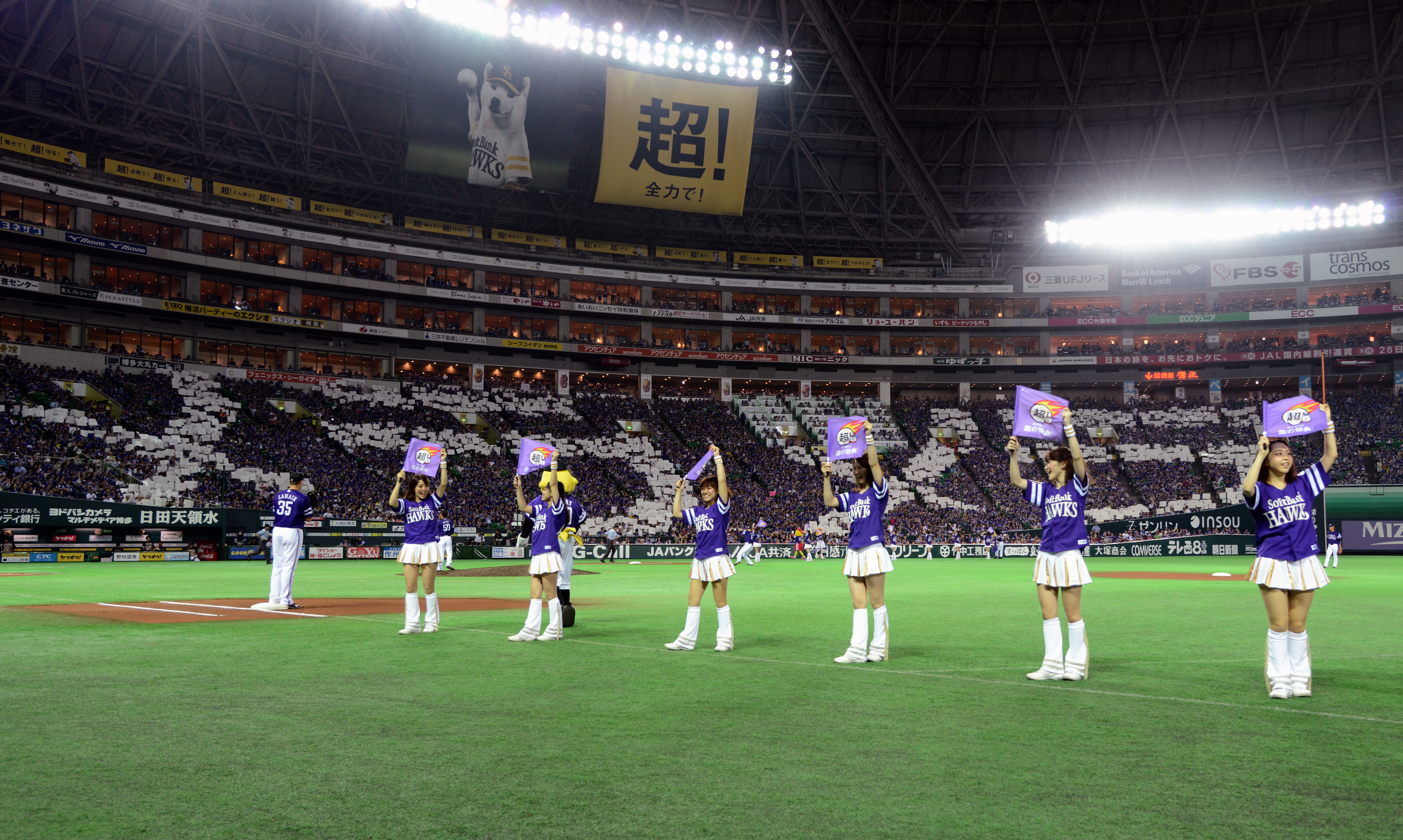 2013年度の "鷹の祭典" 。2013年7月27日福岡ヤフオク！ドームにて開催